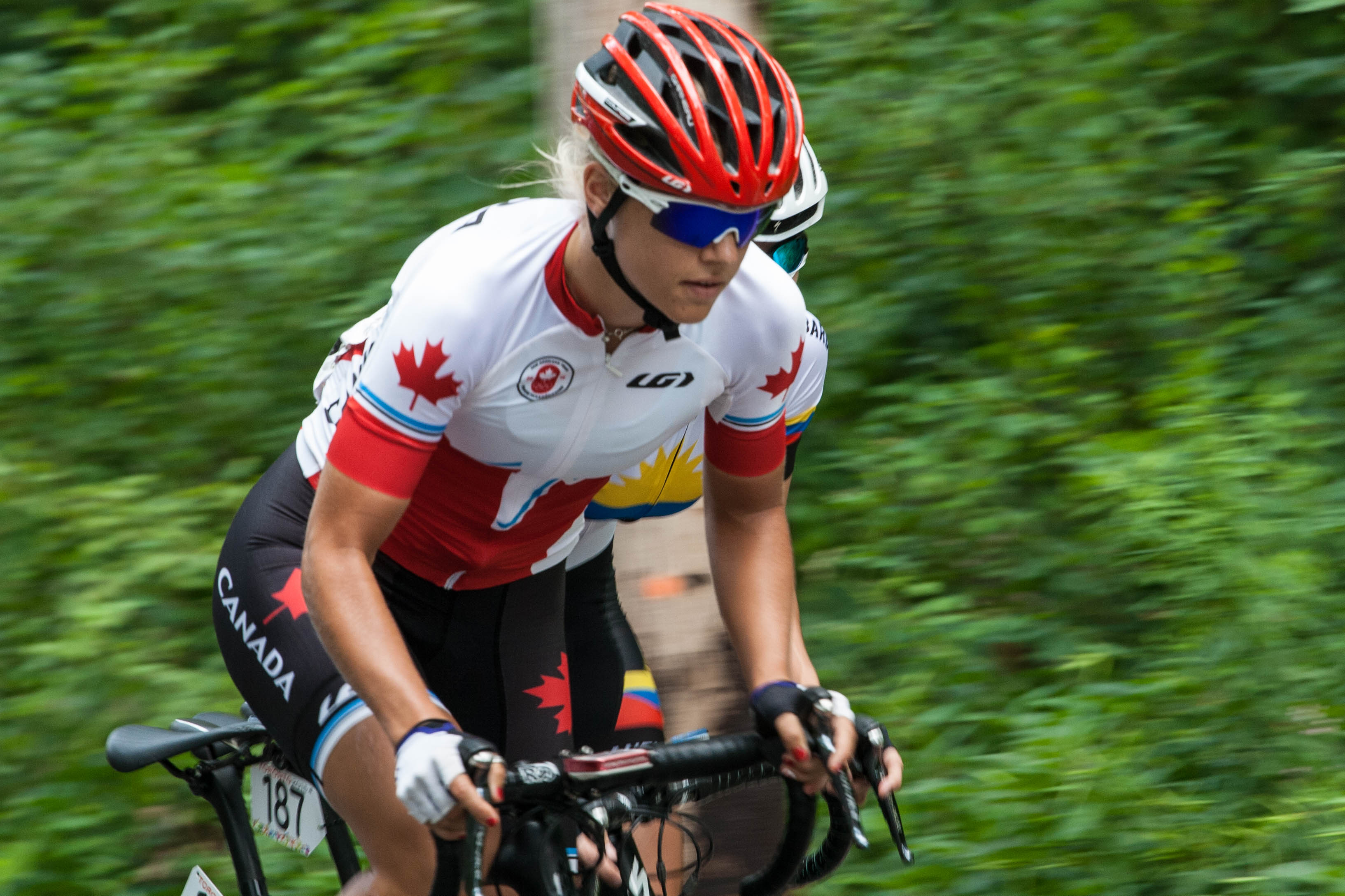 Panam Games 2015 - Kirsti Lay